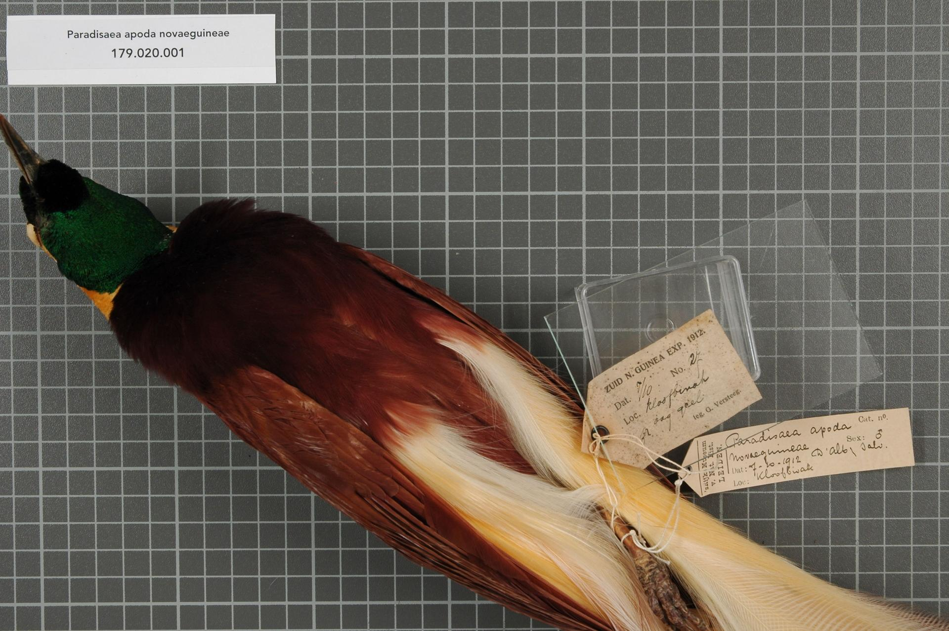 Paradisaea apoda novaeguineae D'Albertis and Salvadori, 1879